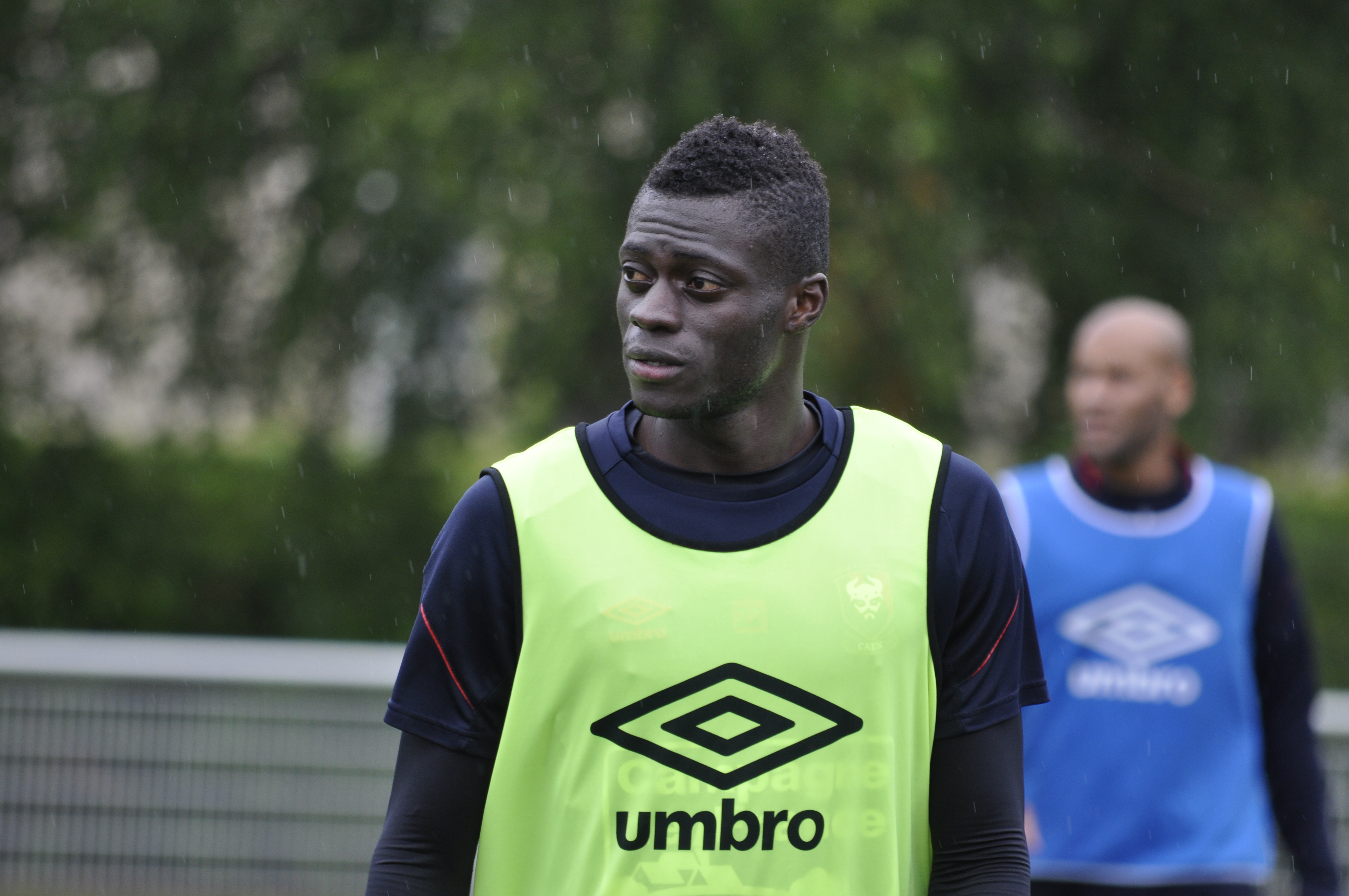 Pape Sané lors d'un entrainement du Stade Malherbe Caen